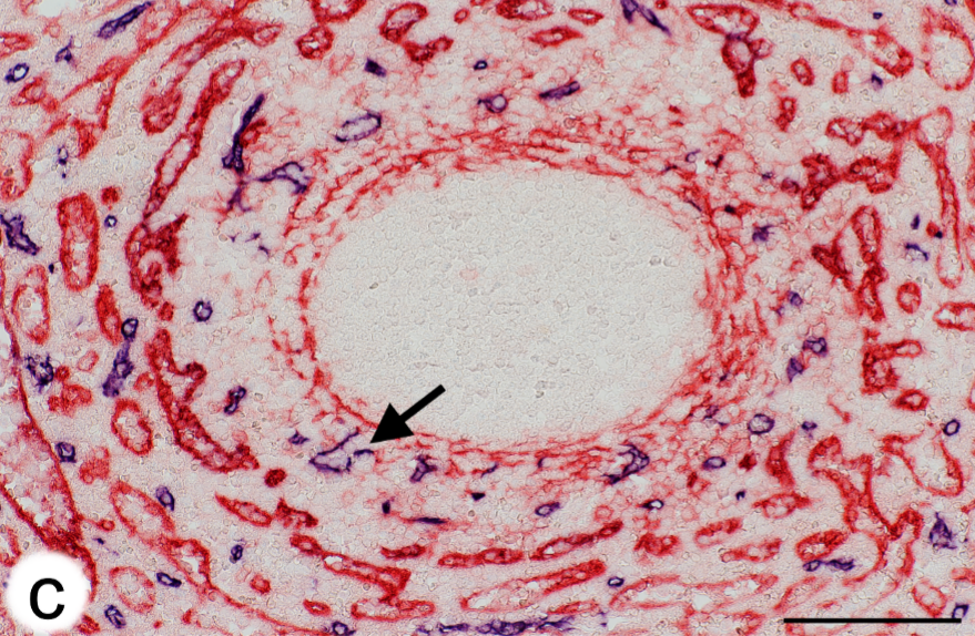 Fig. 4. Localización de la red capilar perifolicular en relación con las células del estroma, las células de memoria B y los plasmablastos en el bazo humano. (c) Doble tinción para CD34 (azul) y CD141 (rojo) en una sección de parafina. CD141 muestra senos venosos en la pulpa roja y células reticulares marginales (MRC). La flecha indica el extremo abierto de un capilar perifolicular. Bazo humano. Barra de escala= 100 μm.